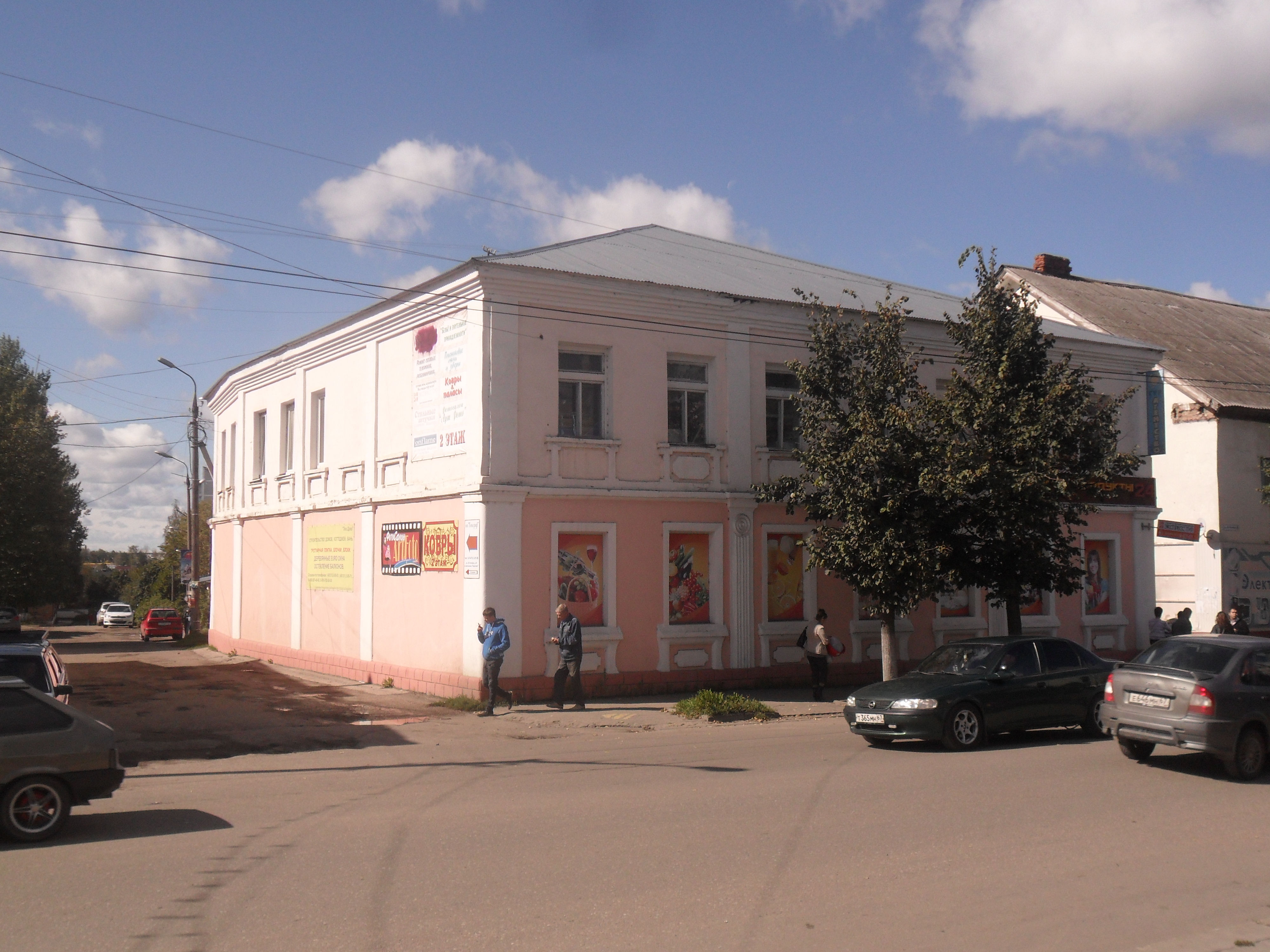 Памятник архитектуры регионального значения. Дом Лютова 2-й половины XIX века.